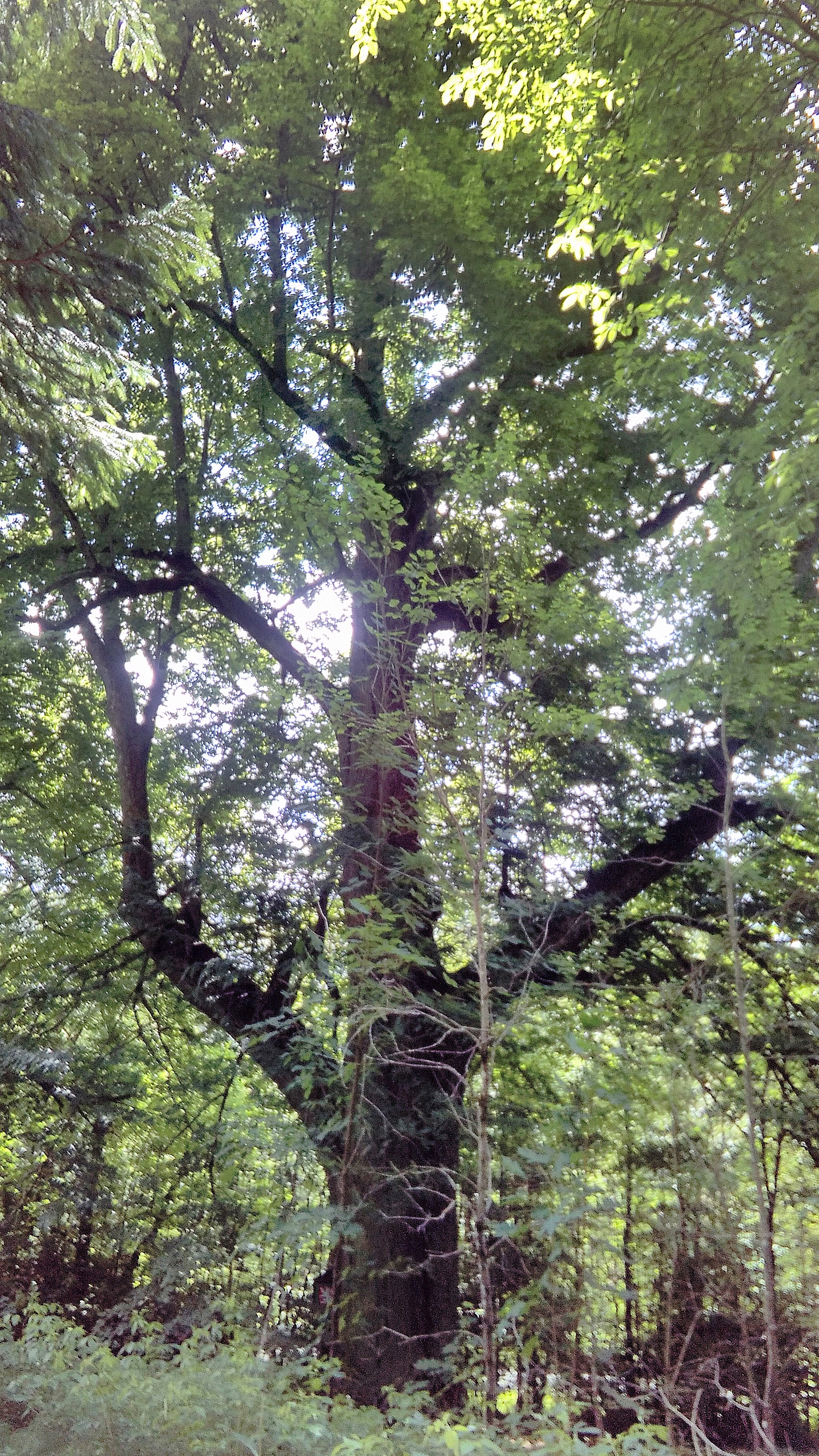 Alžbětínská lípa